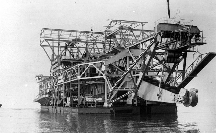 Repronegatief. Op Billiton was de tinexploitatie in handen van de Billiton Maatschappij, met deelname van het Gouvernement. De Maatschappij was daar in 1860 met de tinwinning begonnen. De Billiton Maatschappij was een kapitaalkrachtige onderneming en een hoge mechanisatiegraad was typerend voor de winning en verwerking van de tin op Billiton. Het summum van technologische ontwikkeling in de branche was de op de foto afgebeelde emmerbagger. Daarvan was er in 1924 één op Billiton werkzaam. In 1937/8 waren er 12 emmerbaggers in bedrijf. Een dergelijke 'zeemolen' bracht niet alleen grond naar boven, maar was in feite een complete fabriek die meteen het erts uit de grond haalde. (P. Boomgaard, 2001). De emmerbagger Doejoeng voor anker voor de kust van Billiton